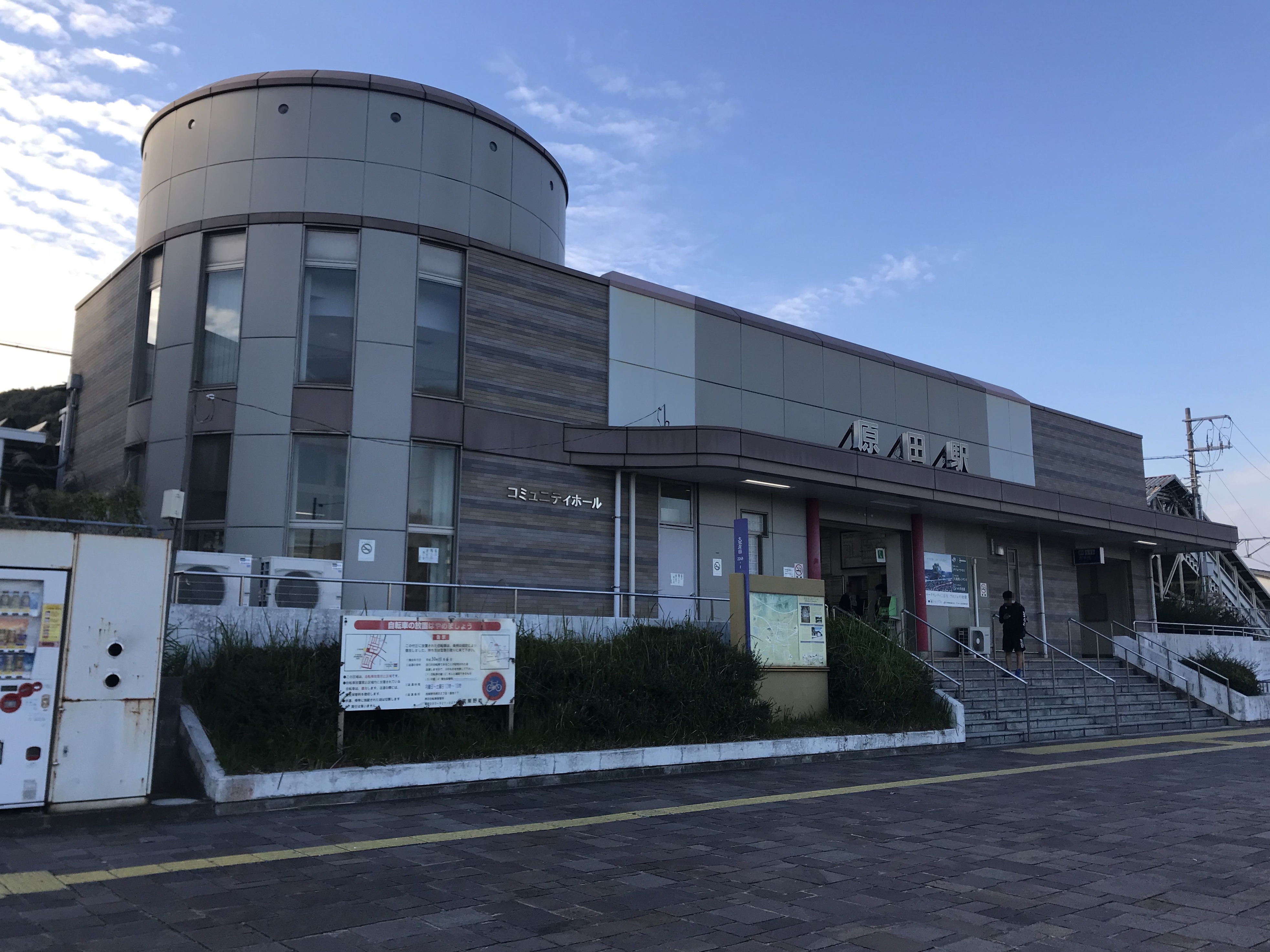 原田駅の駅舎